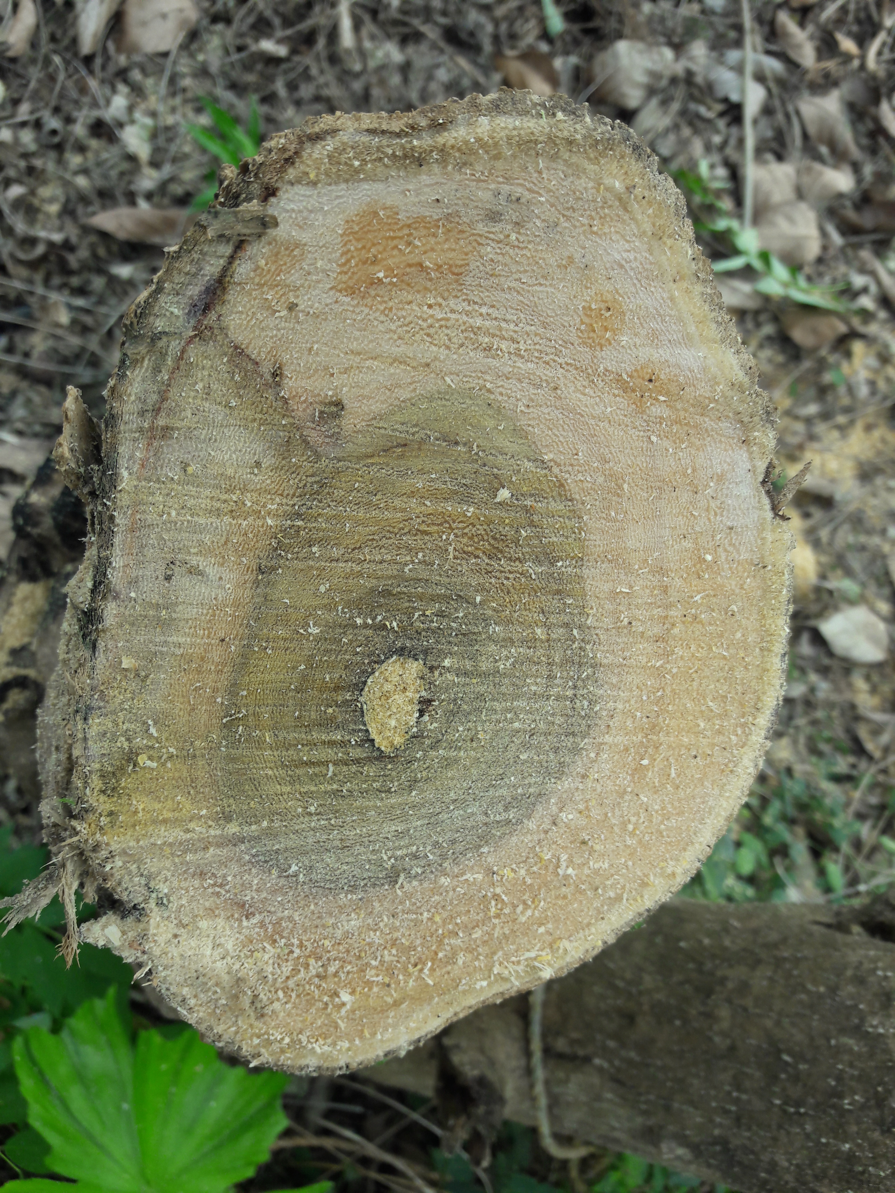 ശീമക്കൊന്ന മരത്തിന്‍റെ കാതല്‍(Heart wood).Gliricidia tree ശാസ്ത്രീയ നാമം Gliricidia sepium കുടുംബം Fabaceae.